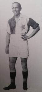 Otakar Škvain (1894-1941), český fotbalista, československý reprezentant a fotbalový trenér